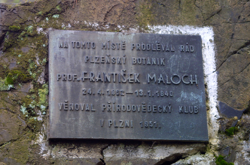 Pamětní deska Františka Malocha z roku 1951 na Malochově skalce. (30. duben 2006)